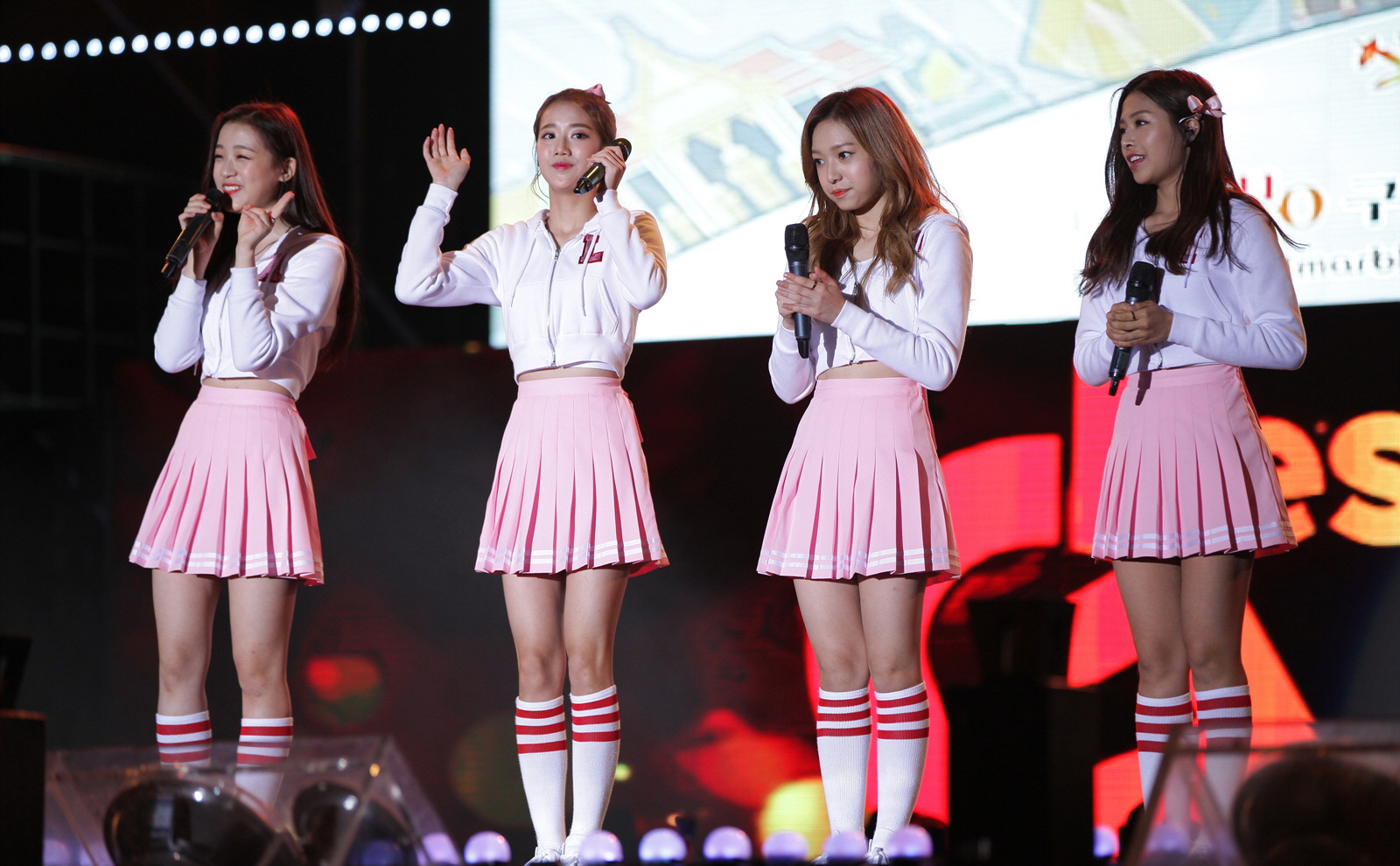 에이프릴(April) 2016 G페스티벌 아시아 청소년 음악제